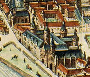 Saint-Mathieu à la Chaîne ou Nouvel Hôpital Extrait